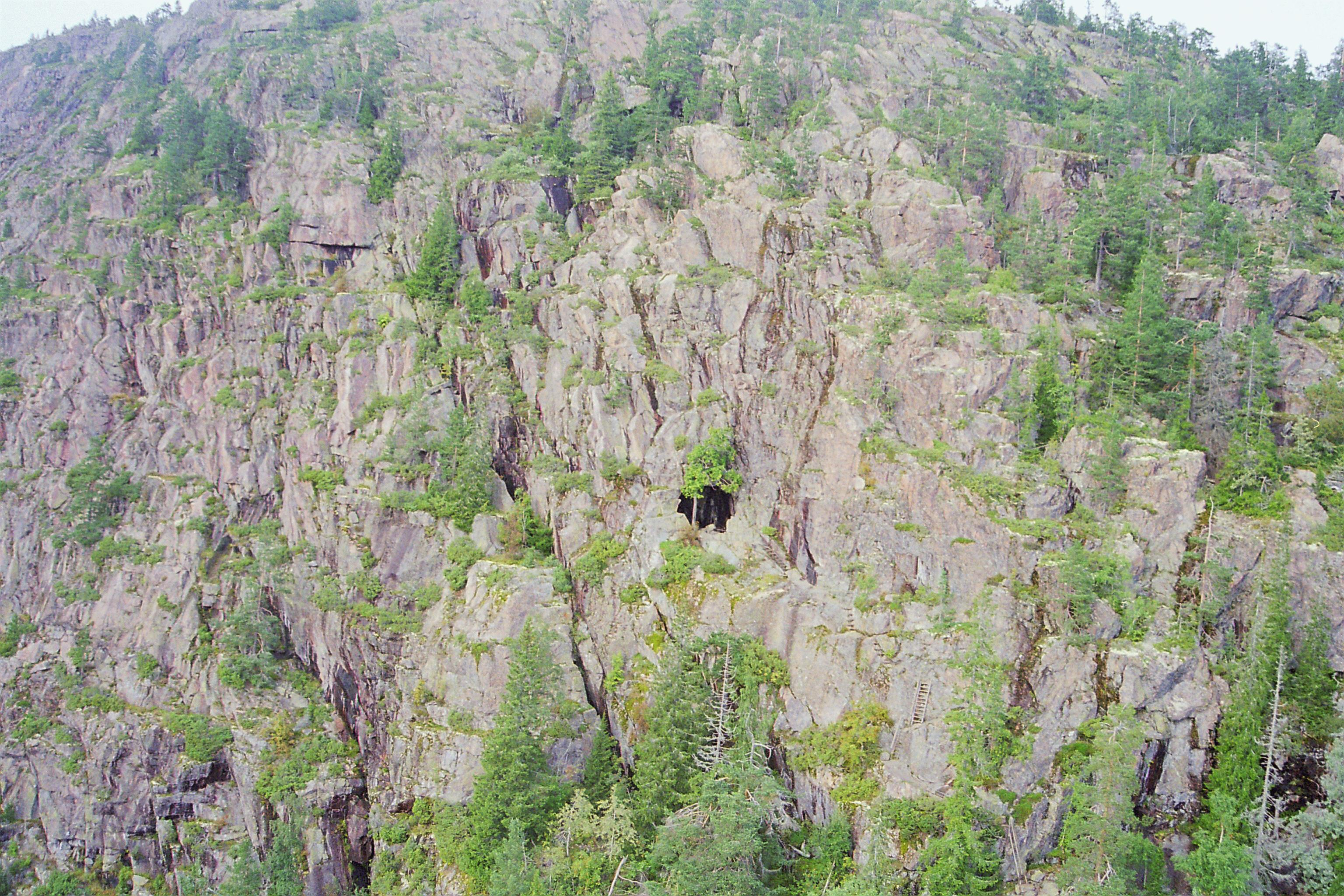 Den legendomspunna Kungsgrottan även kallad Rövargrottan är tydligt framträdande i Skulebergets branta östsida. Vid grottöppningen har en lönn funnit fäste